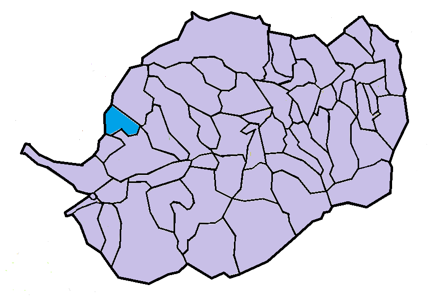 Ralleu en el Conflent, a partir del mapa municipal del Conflent de lliure disposició adaptat al Nomenclàtor toponímic aprovat el 2007